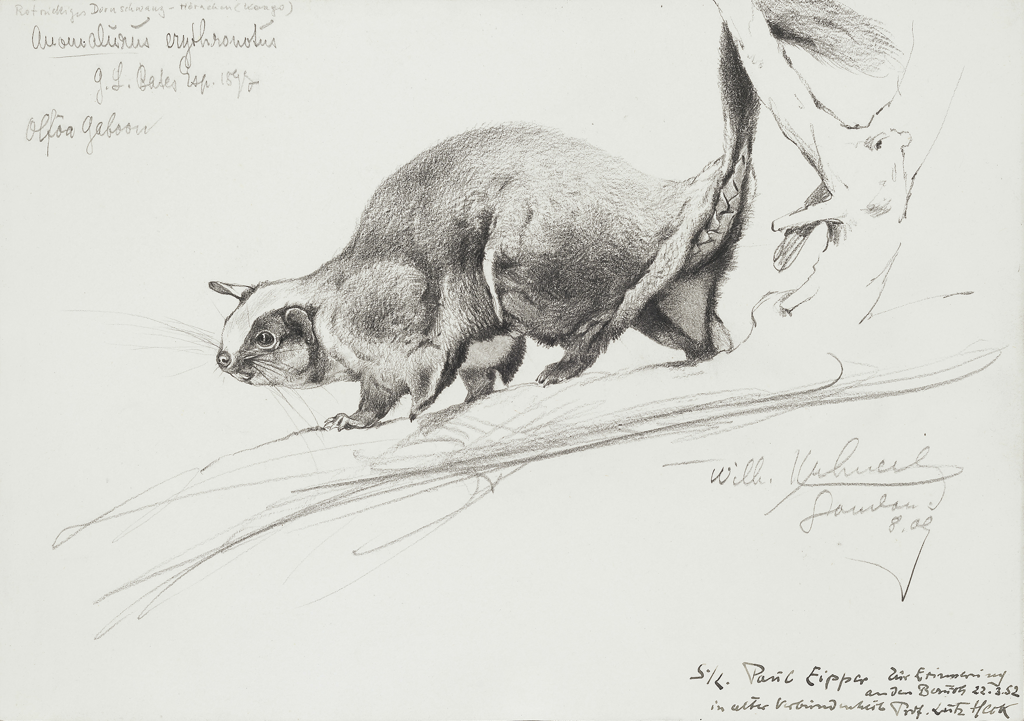 Wilhelm Kuhnert: Rotrückiges Dornschwanzhörnchen